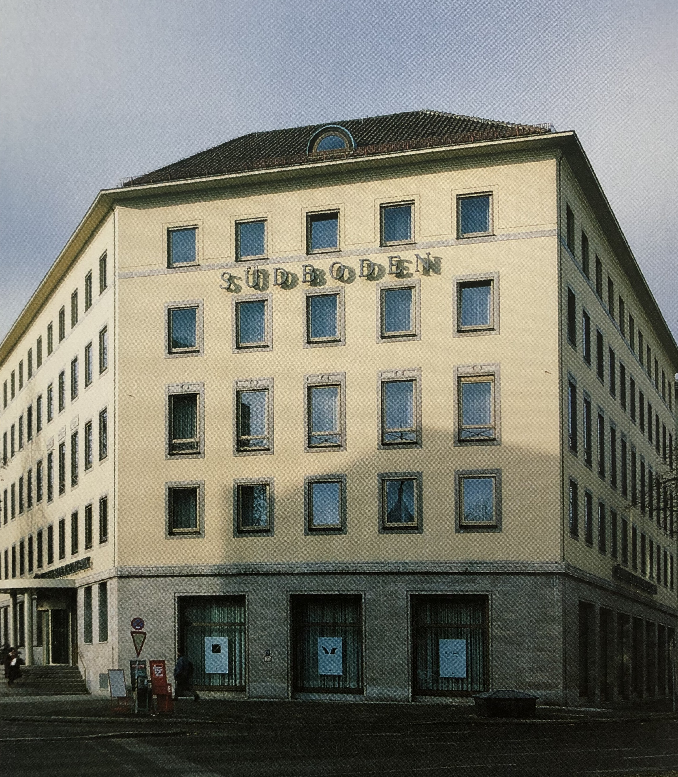 Ottostraße